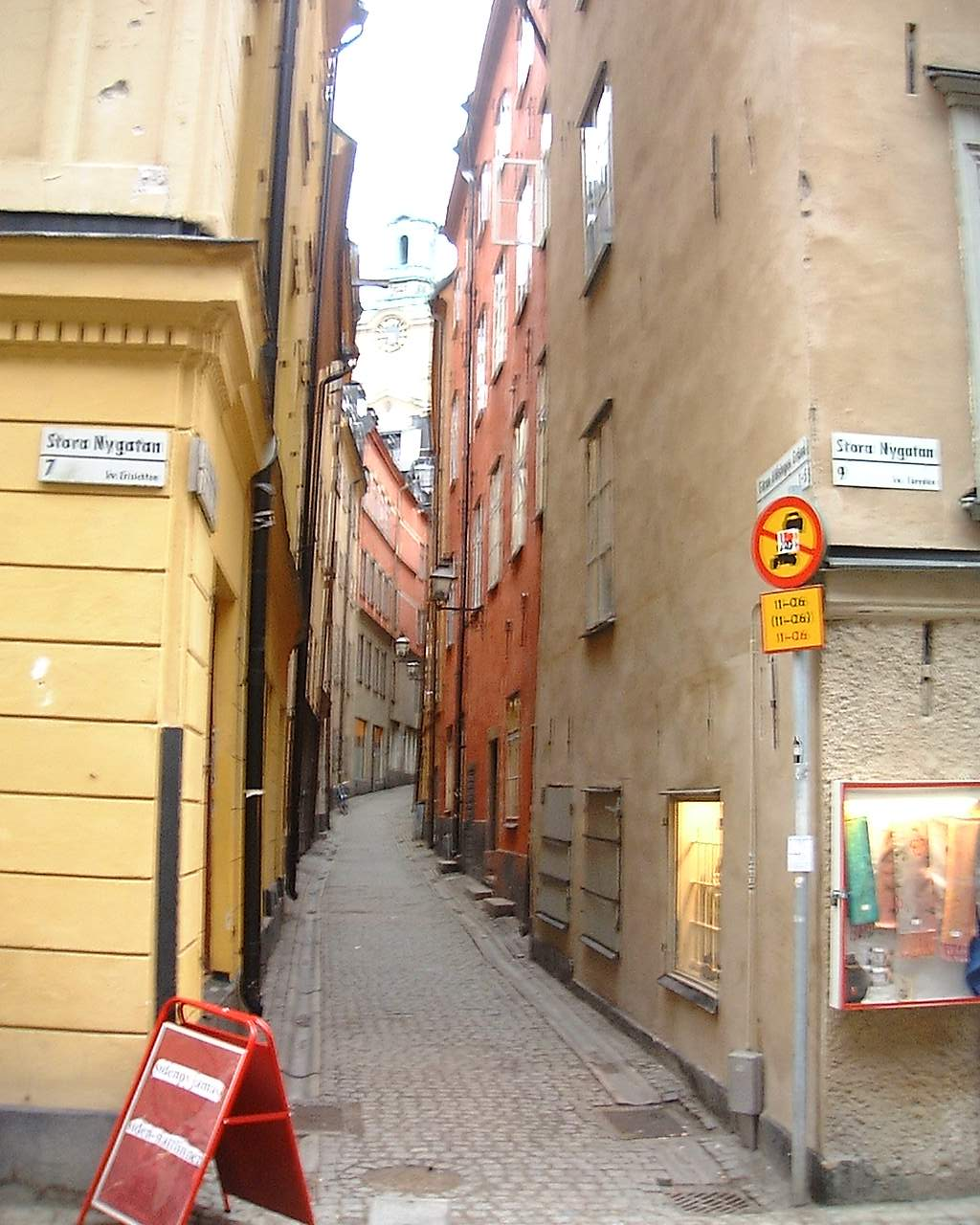 Göran Hälsinges Gränd, Gamla stan, Stockholm